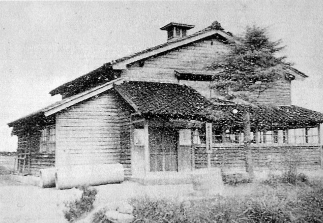 現・氷見市の旧宮田村役場(富山県)